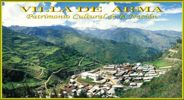 VILLA DE ARMA PATRIMONIO CULTURAL DE LA NACIÒN